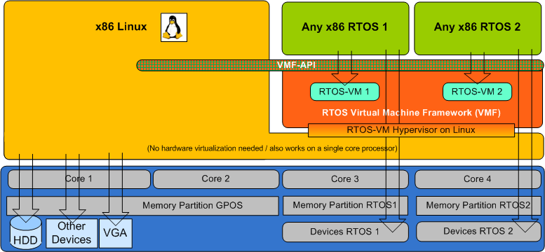 RTOSLin